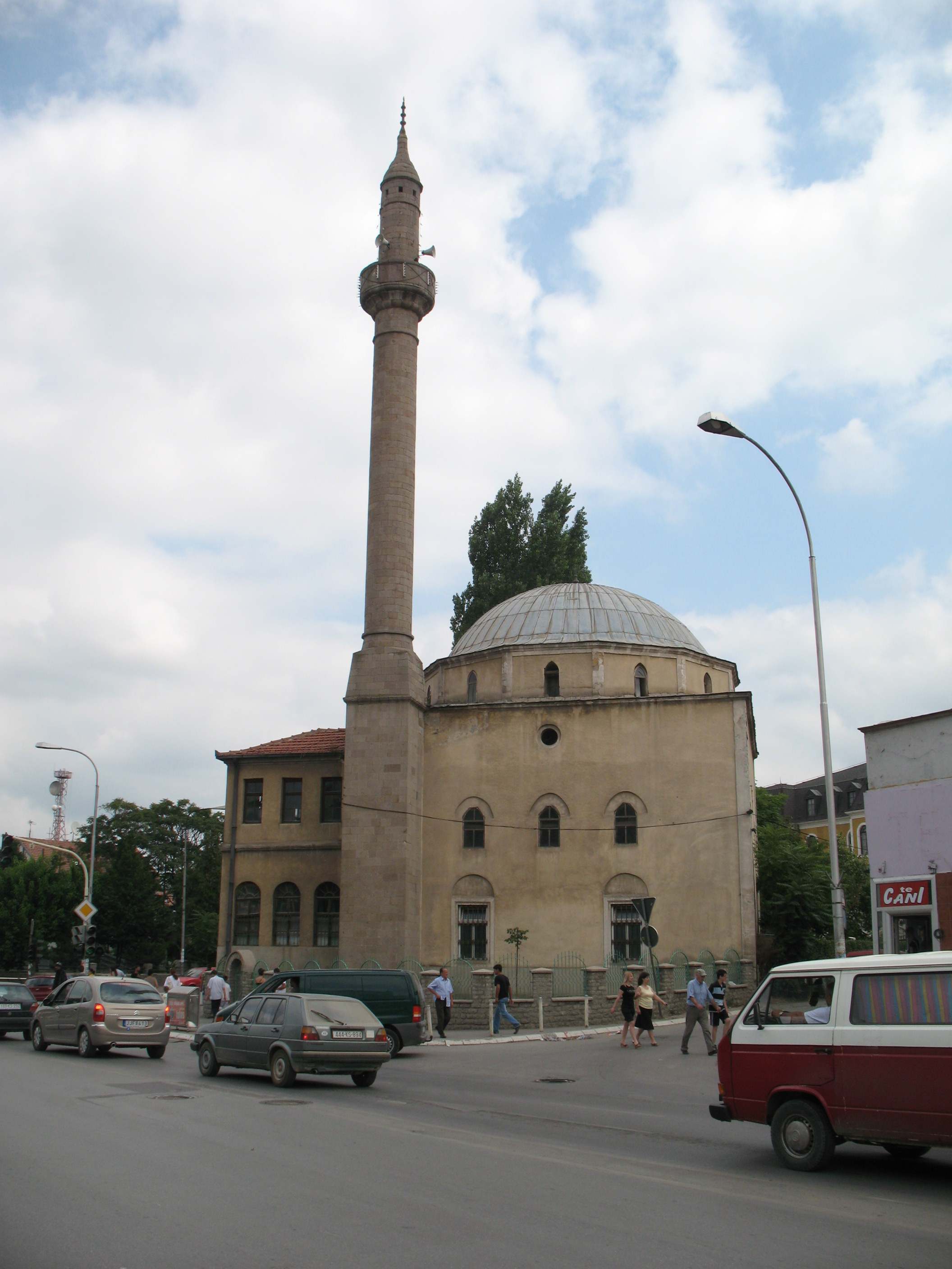 Het oudste gebouw van Pristina, gebouwd in de 15e eeuw in opdracht van Sultan Bajazit